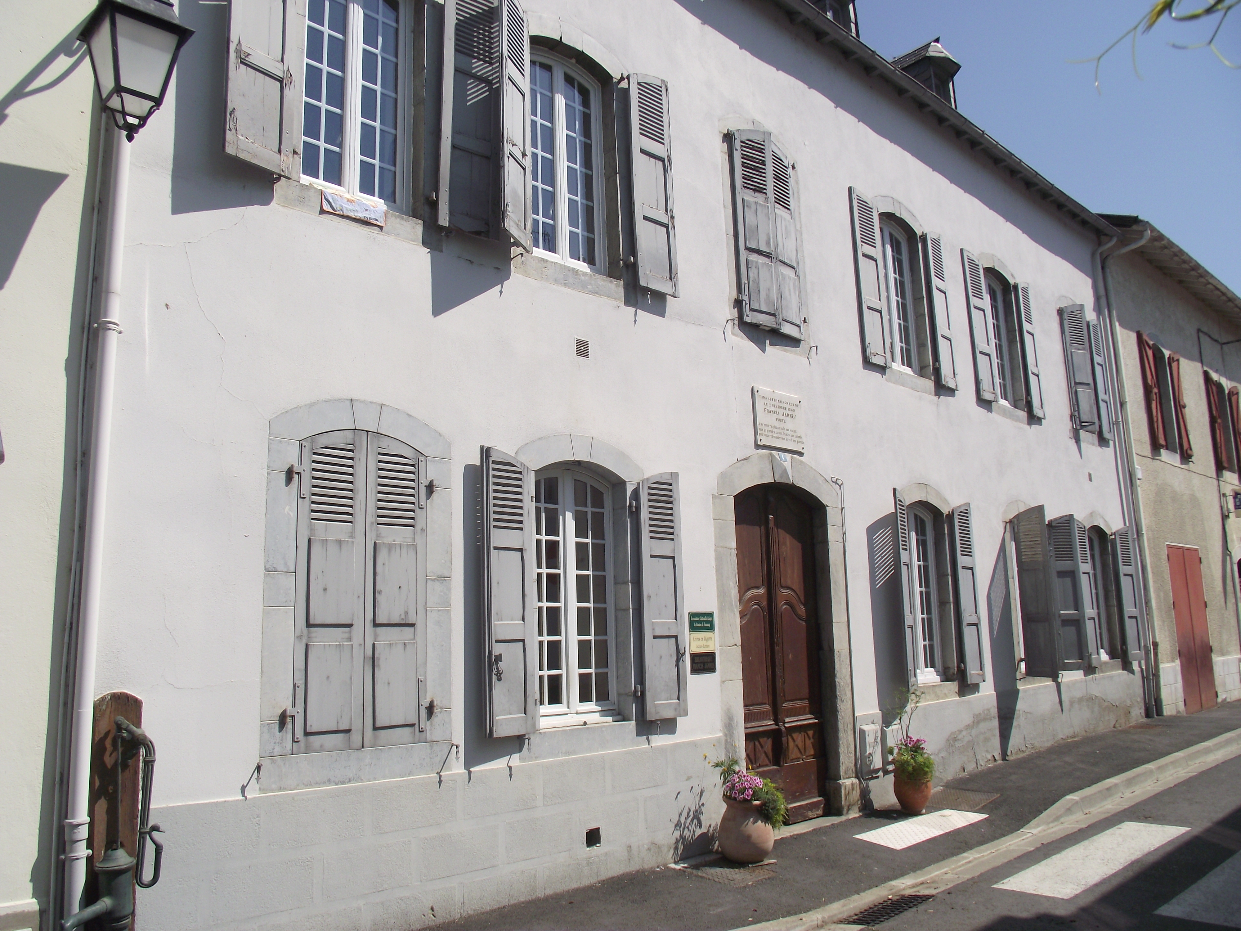 Maison natale de Francis Jammes (Tournay, Hautes-Pyrénées, France)